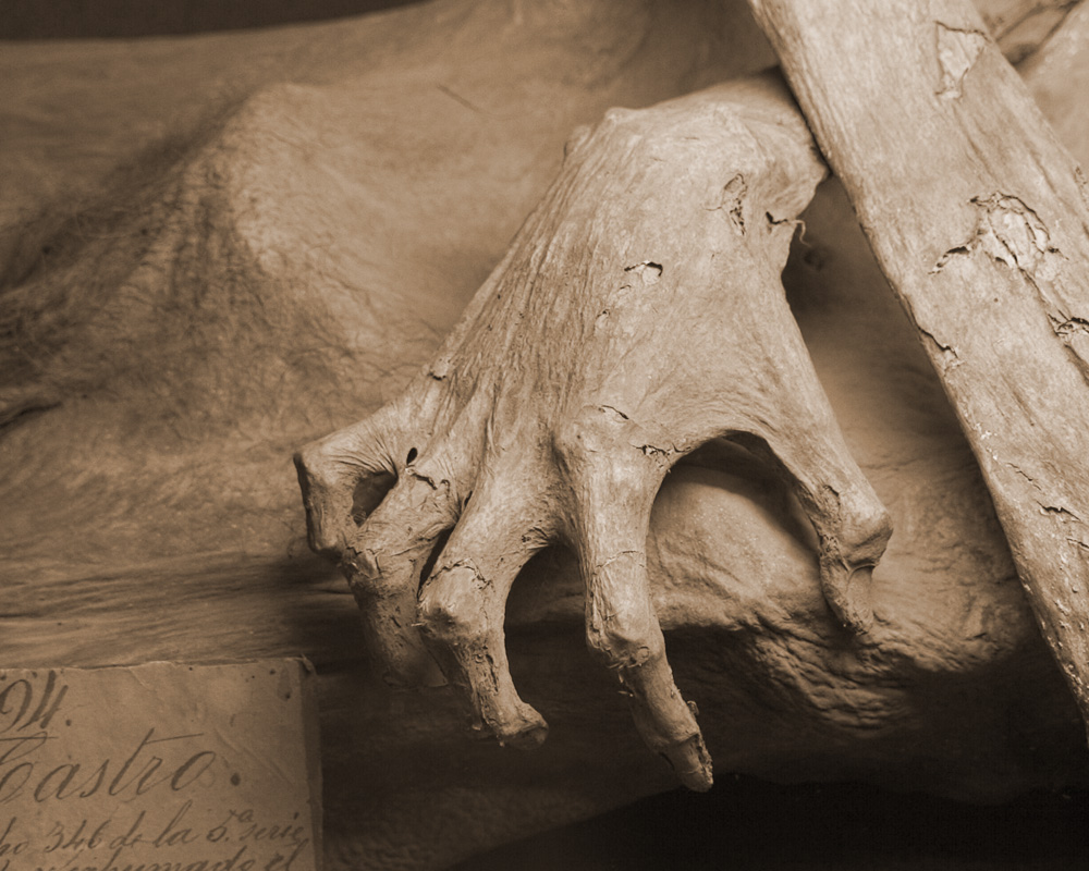 Hand of Guanajuato mummy. Due to weather and soil conditions, bodies tend to dehydrate and mummify in the city of Guanajuato, Mexico. Unclaimed bodies often end up for public exhibit. Рука мумии Гуанахуато. Из-за погодных условий и почвенных условий в городе Гуанахуато (Мексика), органы, как правило, обезвоживются и мумифицируются . Невостребованные тела часто выставляют для общественного просмотра.